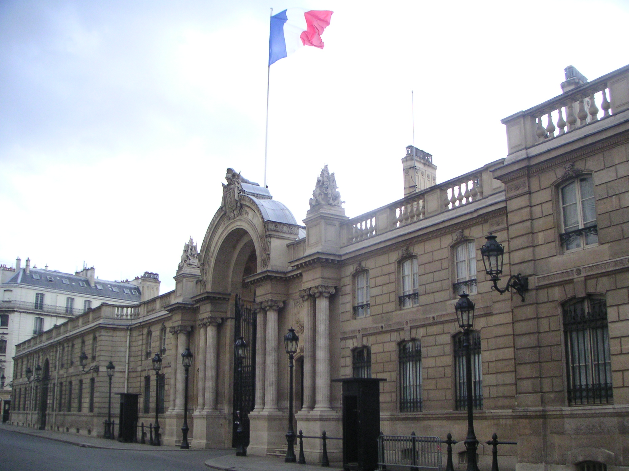 Entrée principale du Palais de l'Elysée à Paris - VIIIe arrondissement - Rue du Faubourg Saint-Honoré.